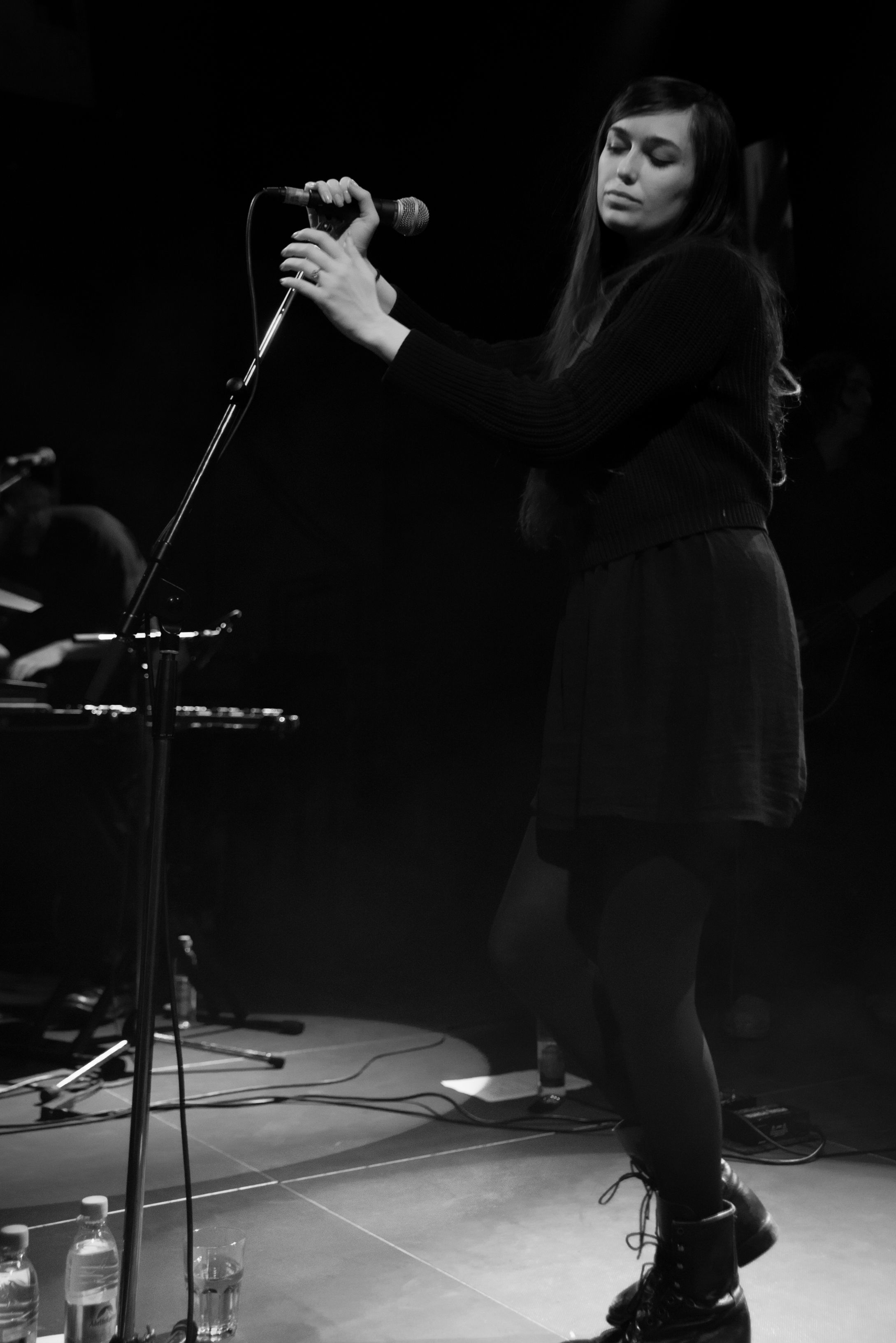 de Cults 2014 Muenchen Kranhalle